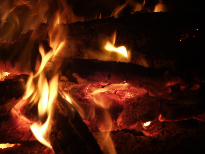 Kleine Flammen im Feuer